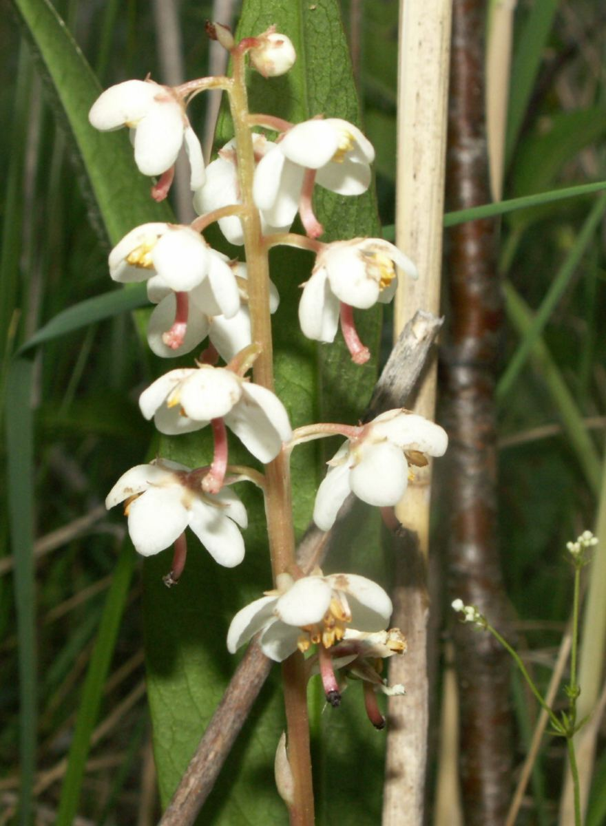 Pyrola rotundifolia Bluete